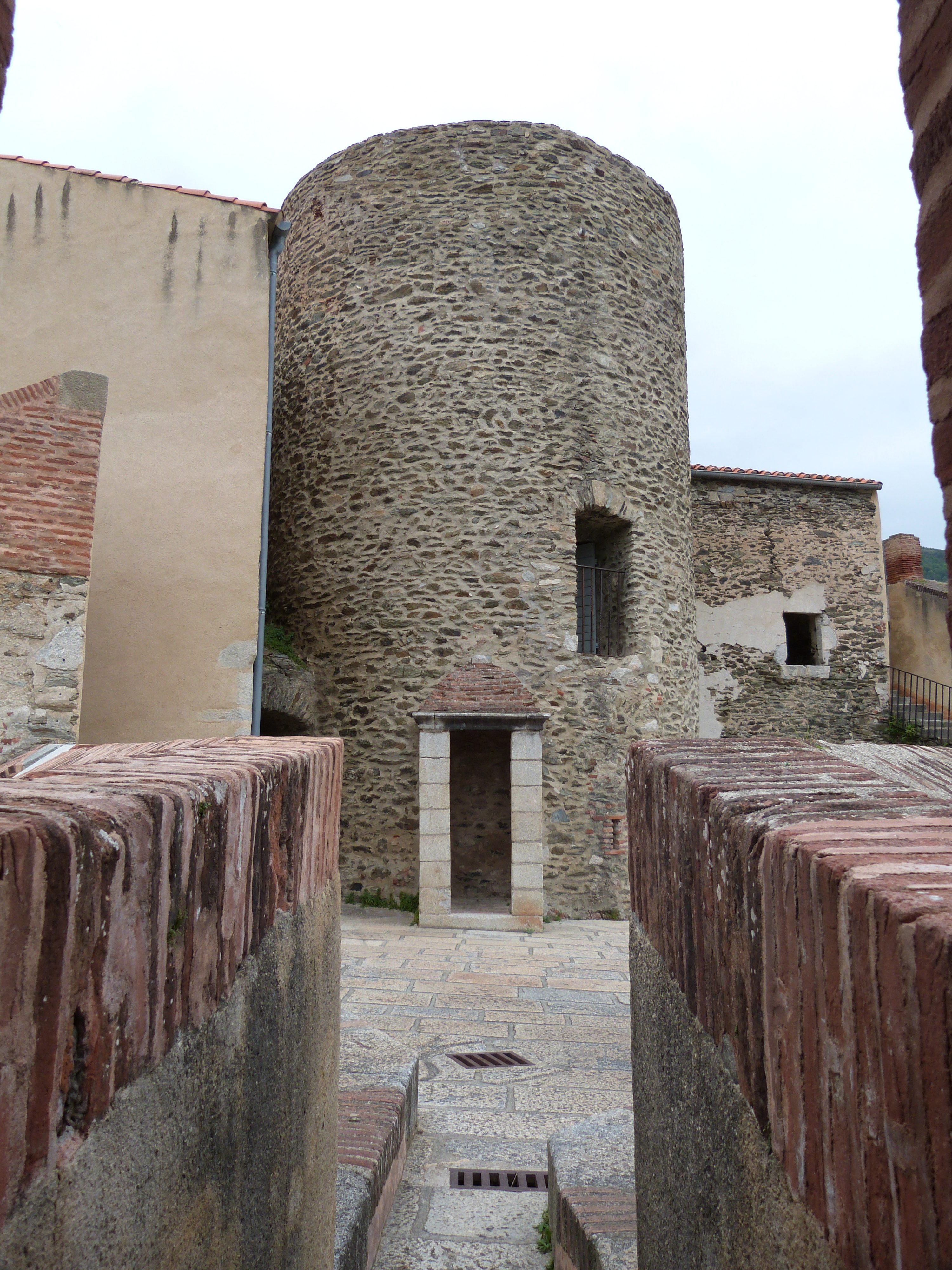 Fort Lagarde de Prats-de-Mollo